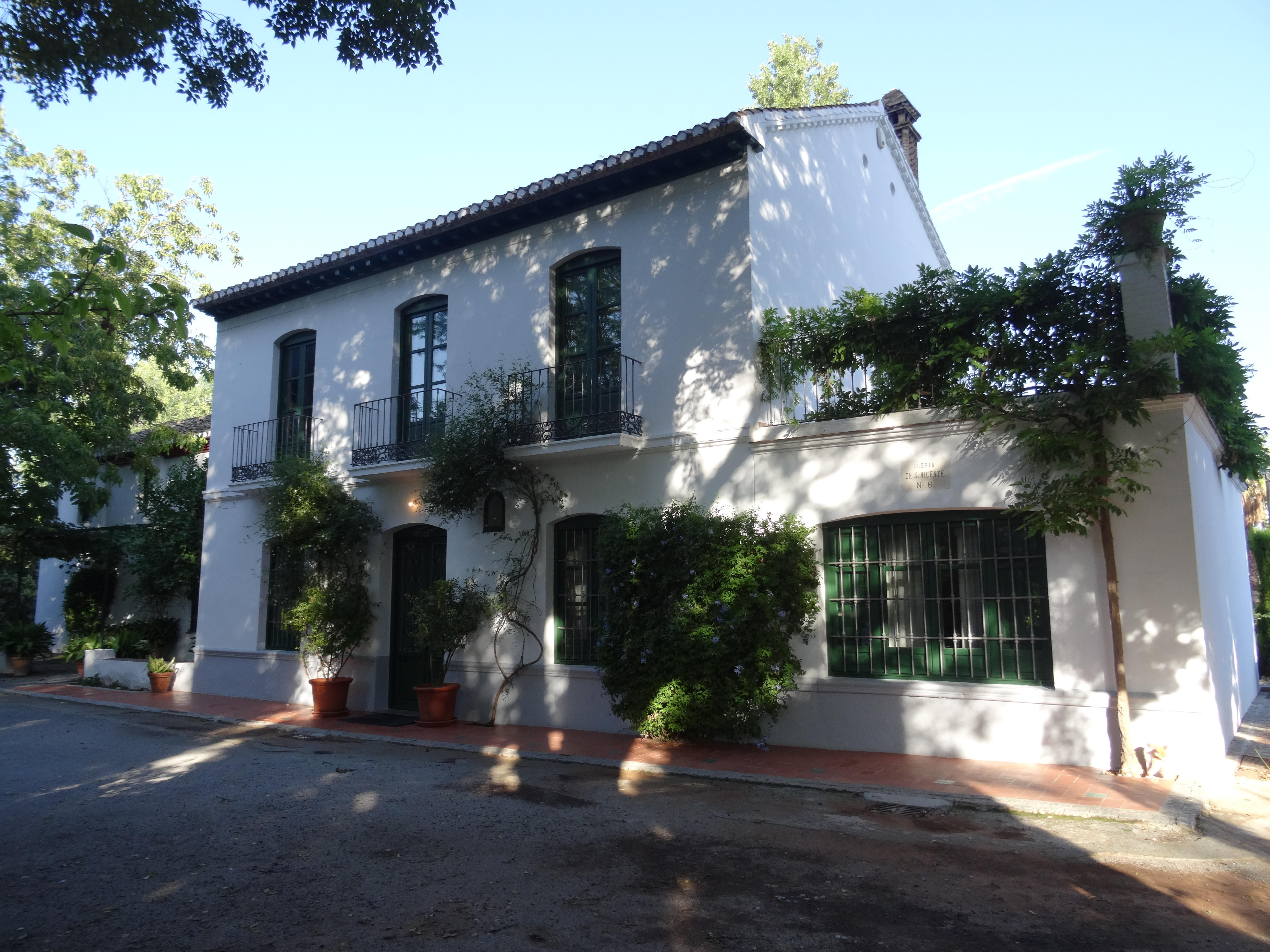 Situada en la calle Arabial, parque García Lorca (Granada)